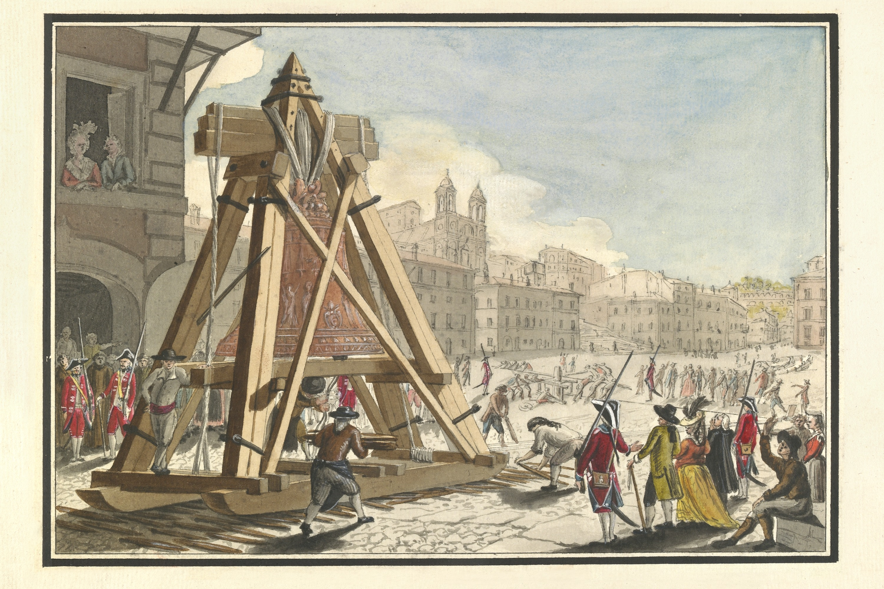 Transport der fertigen Glocke durch die Strassen von Rom. Aus: Giuseppe Valadier: Disegni e spiegazione della fonderia: principio e termine della campana di San Petro, fusa dal Cav. Luigi Valadier e Giuseppe di lui figlio nell’anno 1786. Roma 1786.